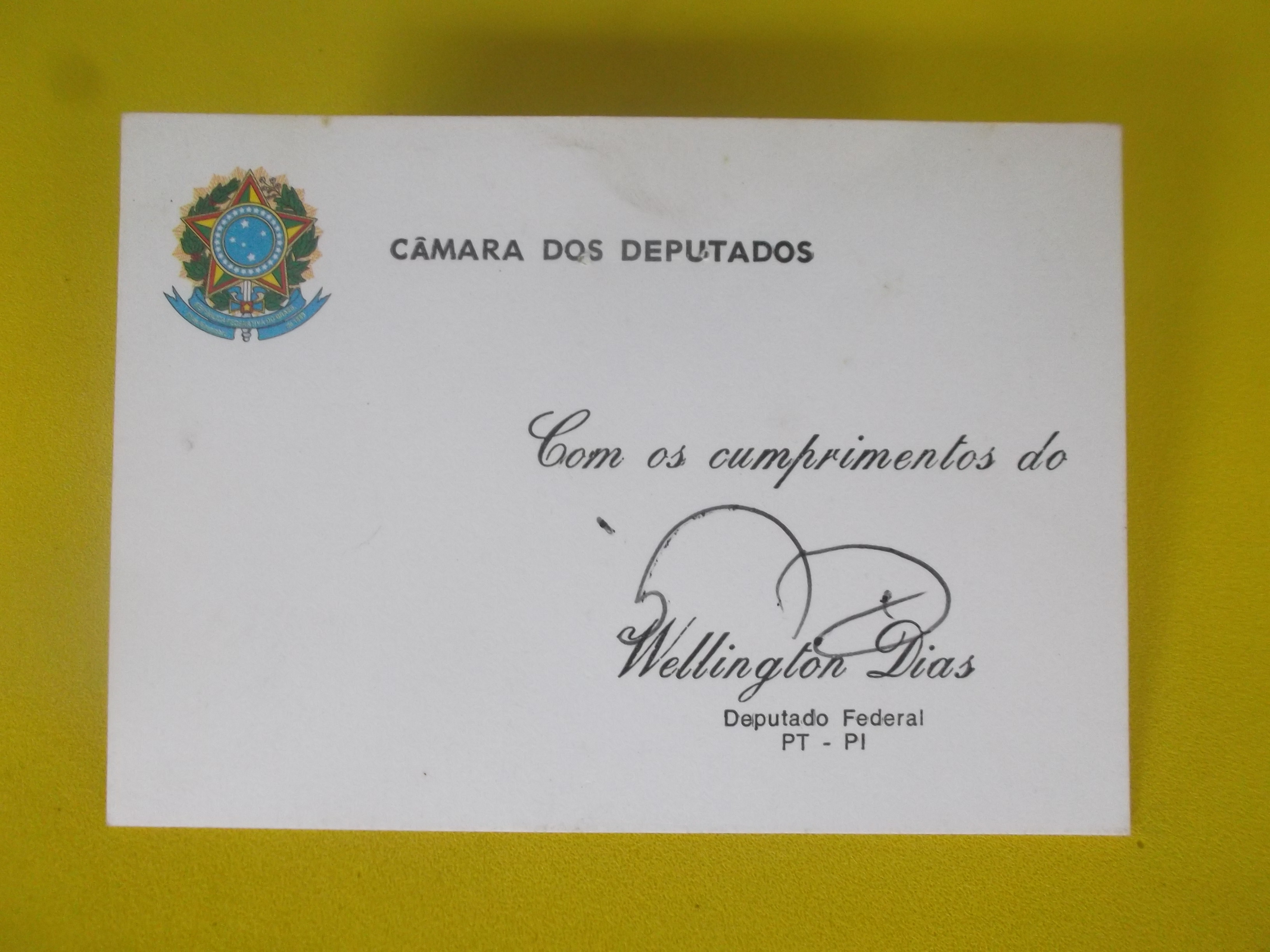 Cartão de visitas (ou cartão-cerimonial) da Câmara dos Deputados do Brasil, deputado federal W. Dias.